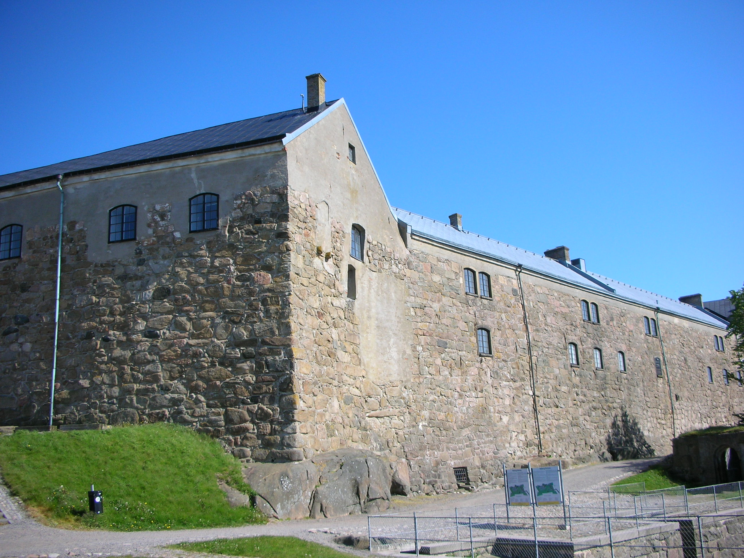 Varbergs fästning